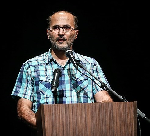 حسین معززی نیا در مراسم افتتاحیه فیلم دهلیز